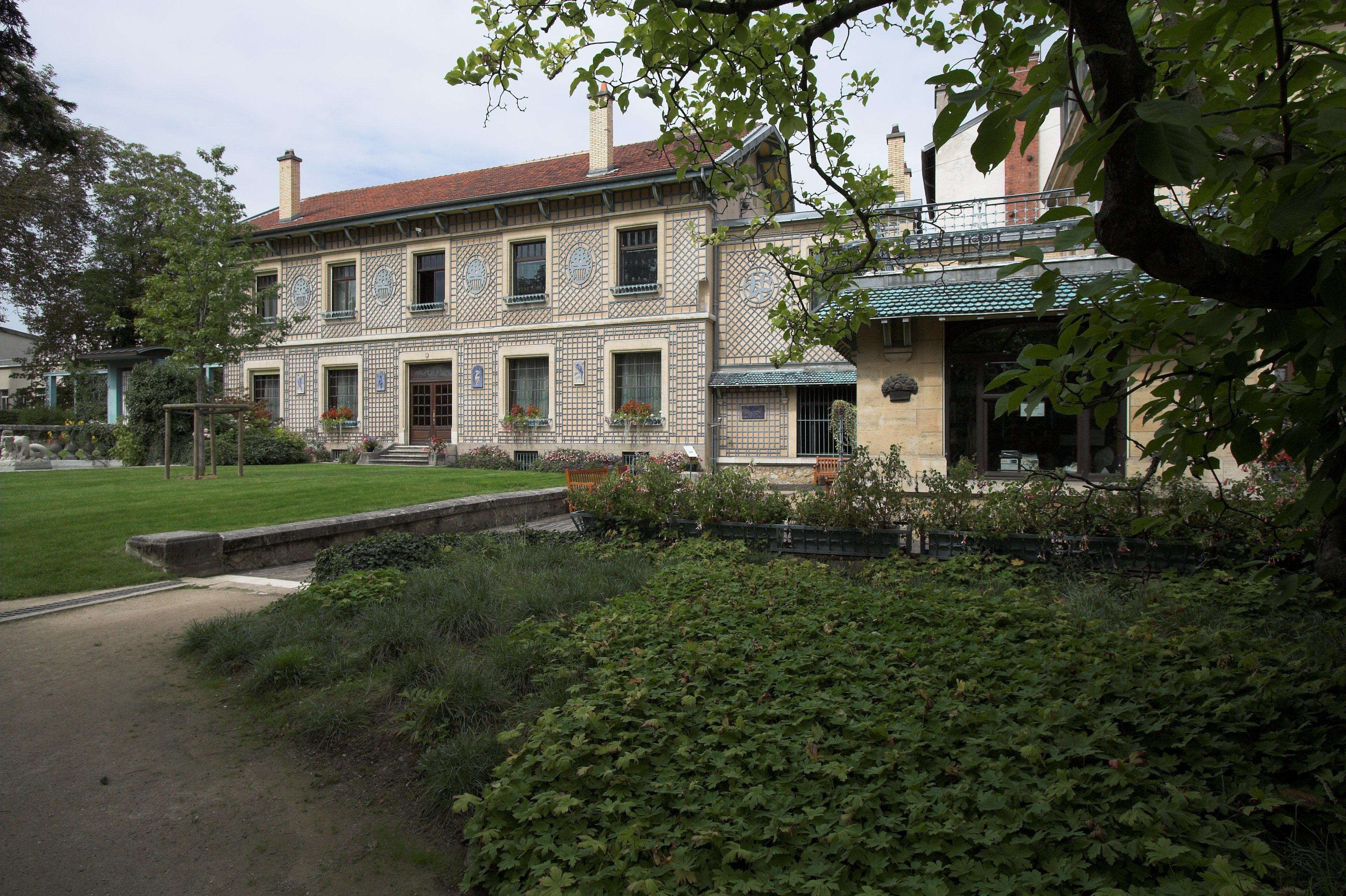 Musée de l'École de Nancy (Nancy, France)